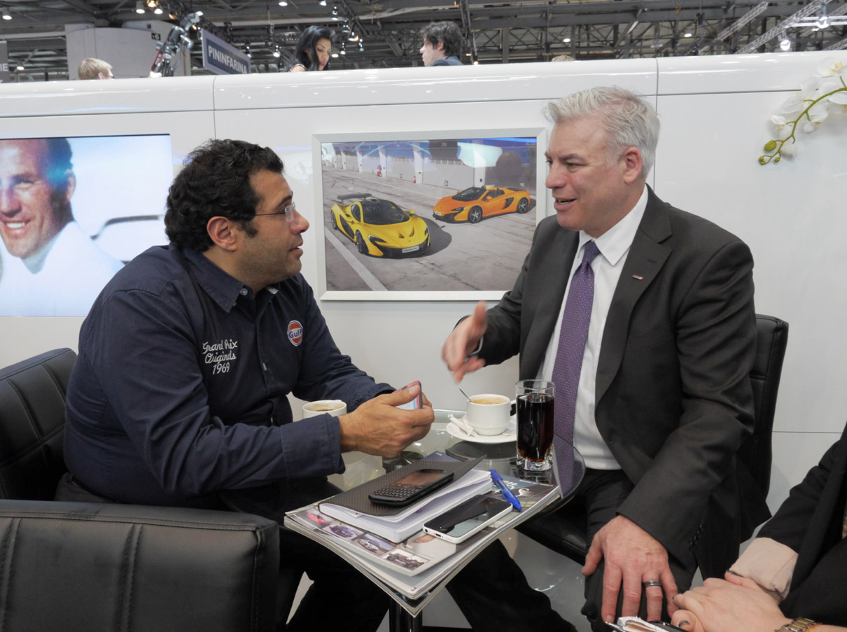 Ahmed Kseibati & Frank Stephenson